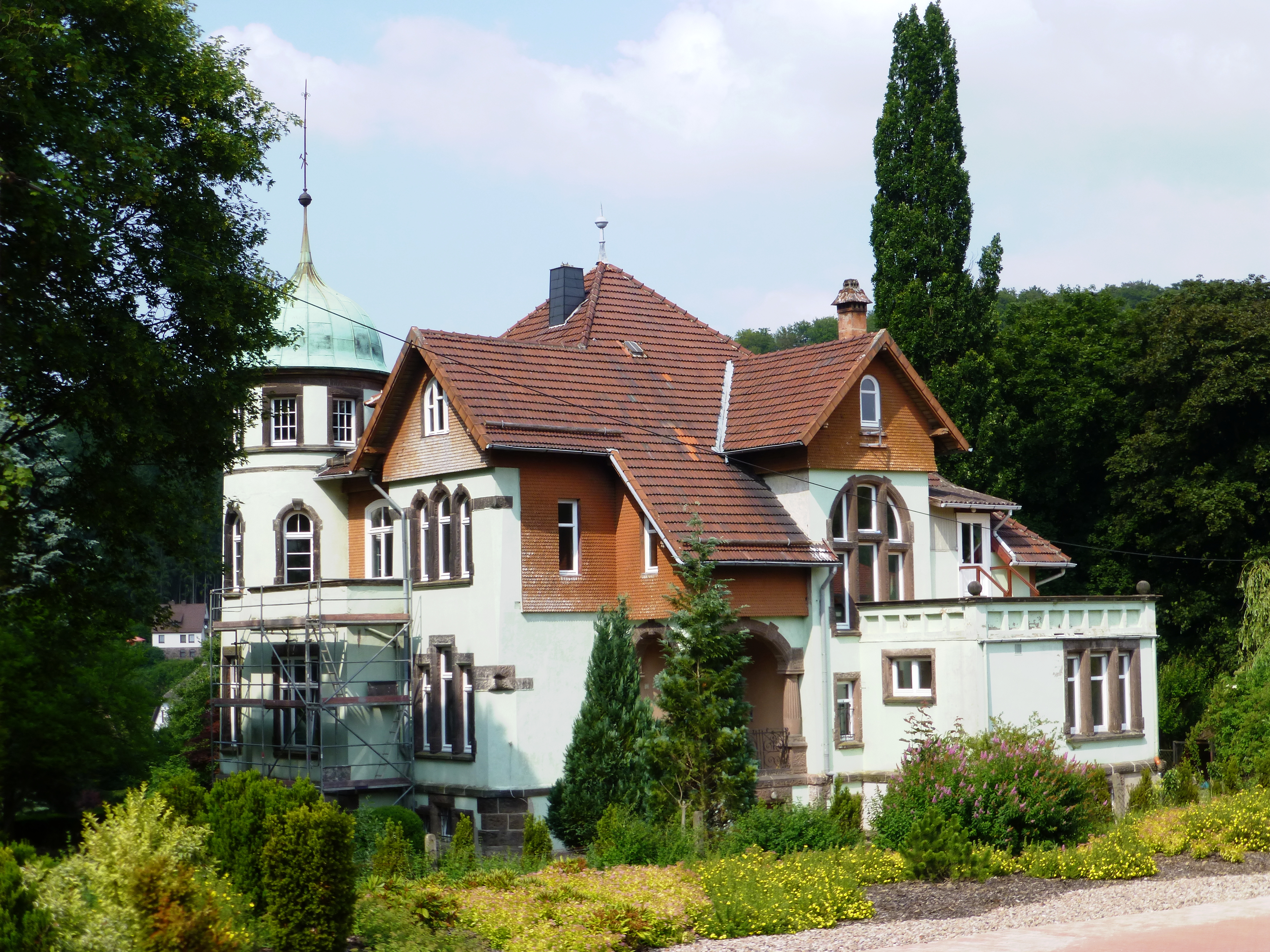 Ehemalige Direktorenvilla des Kalischachtes Volpriehausen, Stadt Uslar, Niedersachsen. Erbaut Anfang 1905 nach Plänen der Architekten Fastje und Schaumann, Hannover